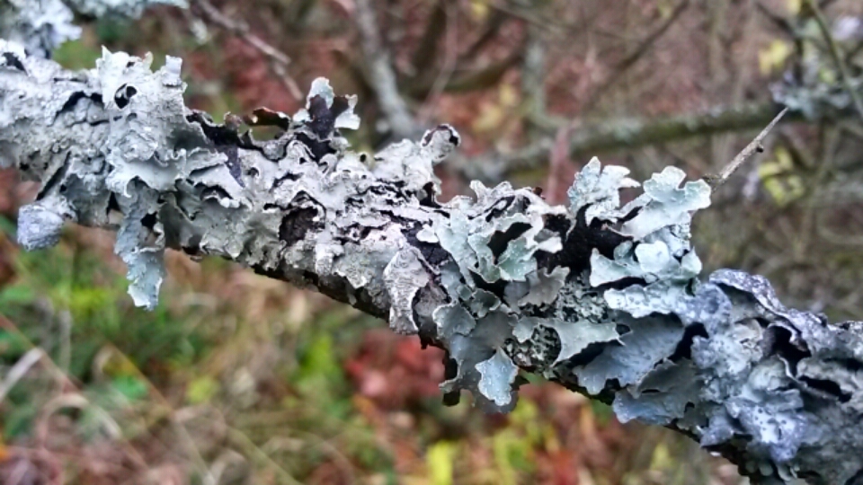 Parmelia sulcata